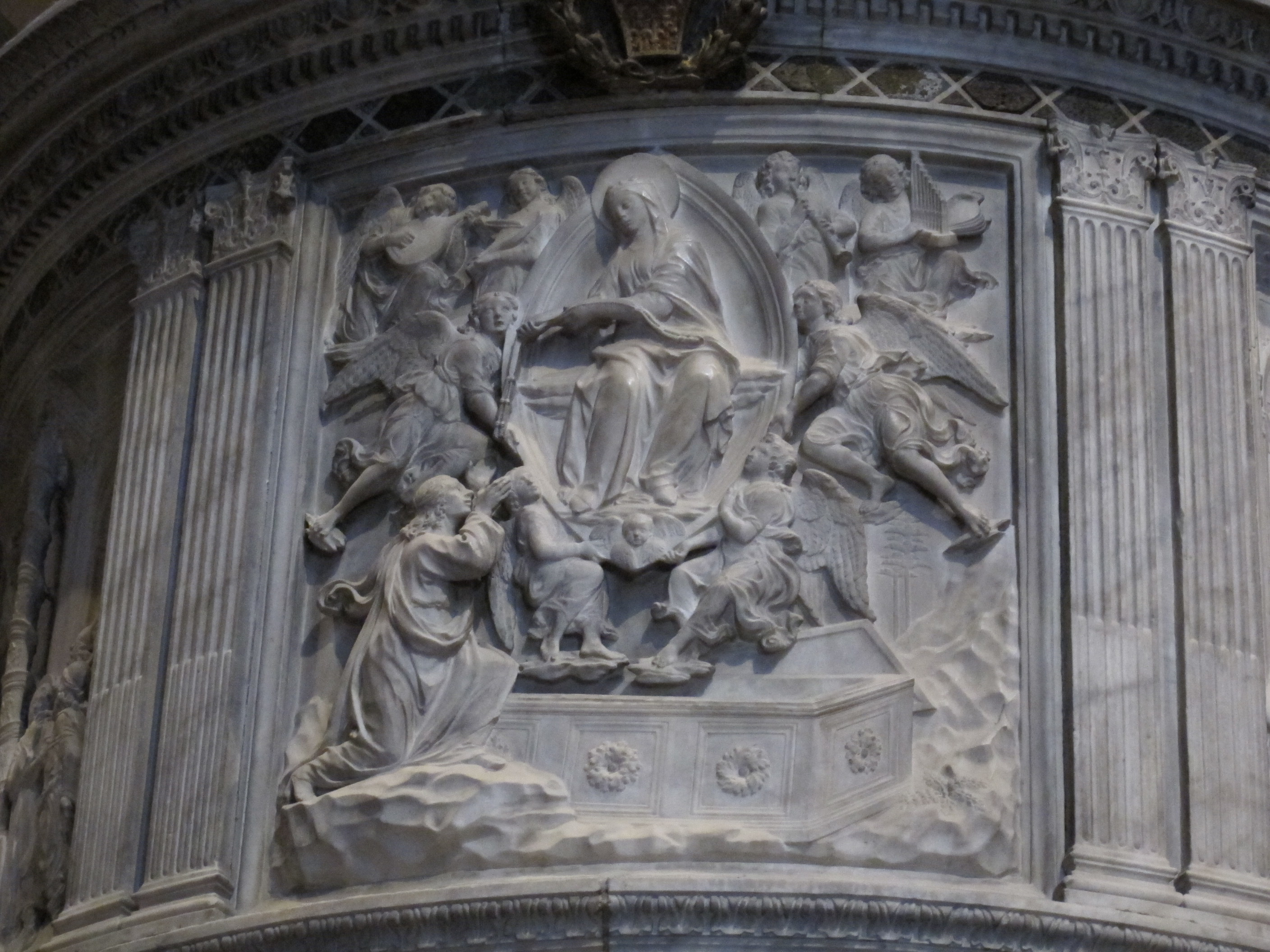 Duomo di prato, pergamo di ant. rossellino e mino da fiesole 10 madonna della cintola 2